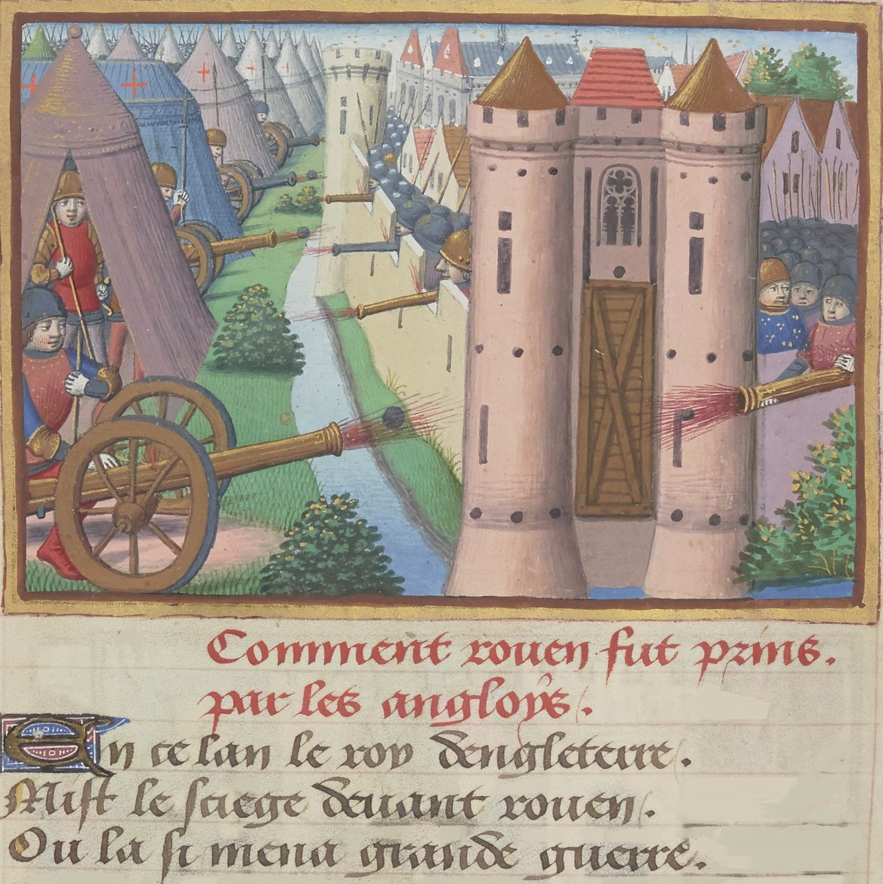 Siège de Rouen (1418-1419). Miniature du manuscrit de Martial d'Auvergne, Les Vigiles de Charles VII, vers 1484, BnF, Manuscrit Français 5054, folio 19 verso.